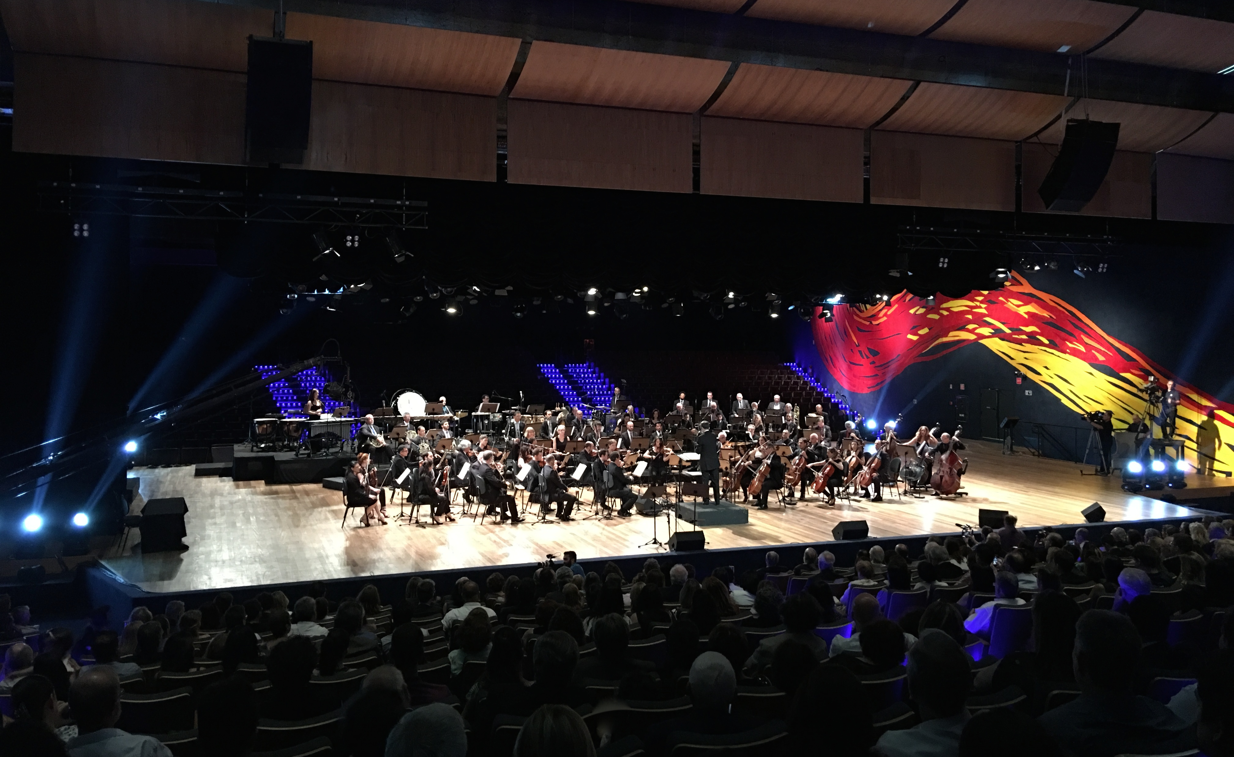 Orquestra Jazz Sinfônica Brasil na reinauguração do Auditório Simón Bolívar do Memorial da América Latina (São Paulo).